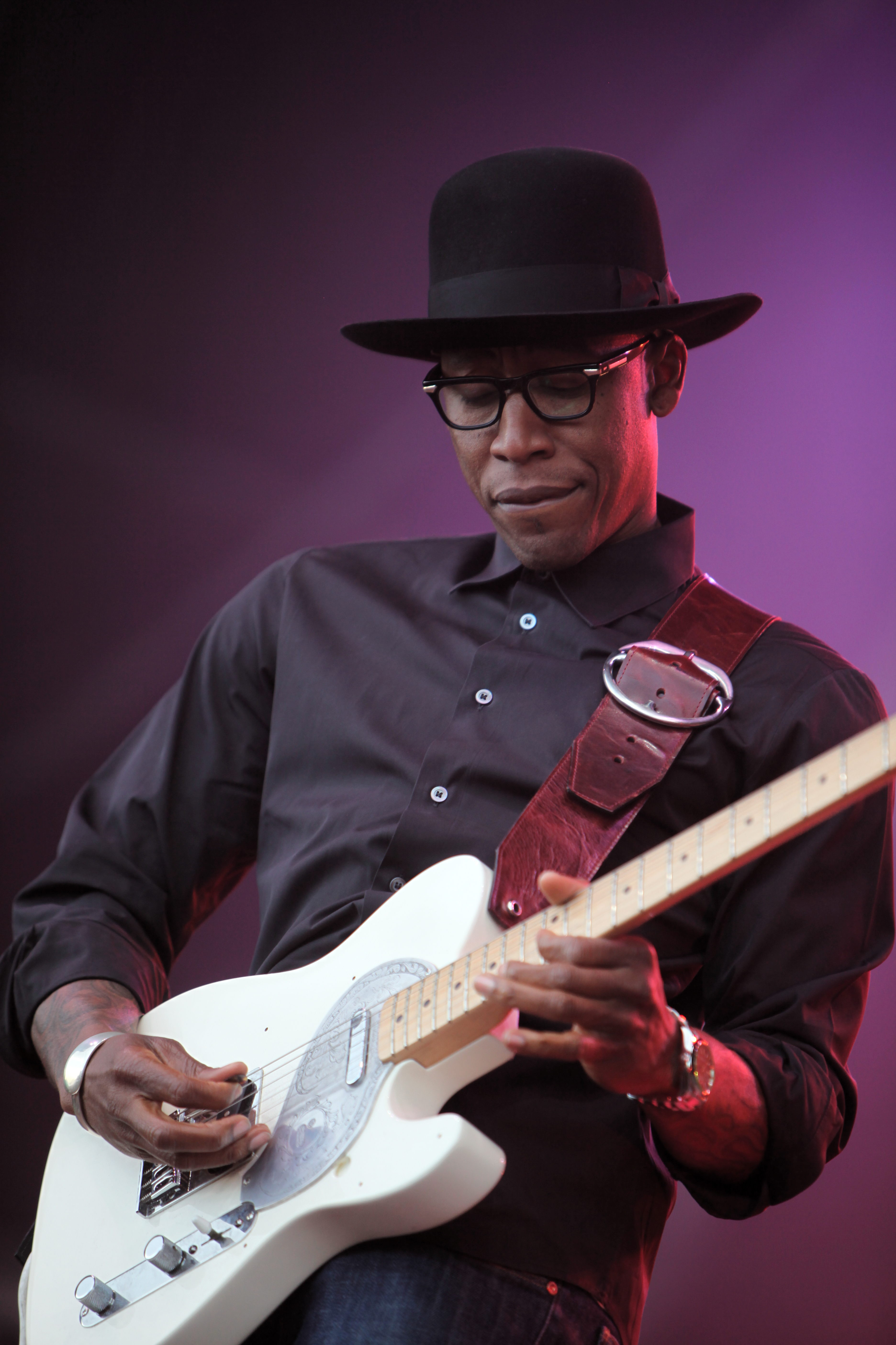 Raphael Saadiq at the Eurockéennes de Belfort 2011